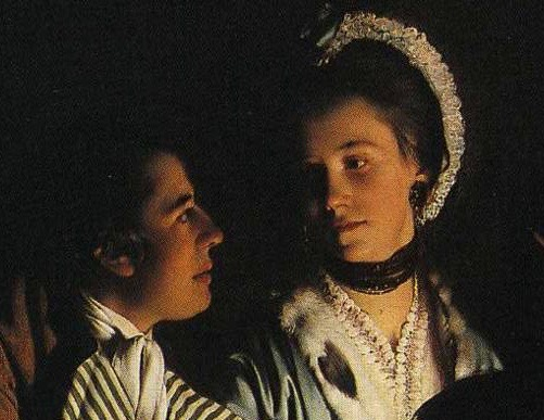 Joseph Wright of Derby (1734–1797): Ein Versuch mit einem Vogel in der Luftpumpe, 1768. Öl auf Leinwand, 183 x 244 cm. National Gallery, London. Detail (junges Paar).